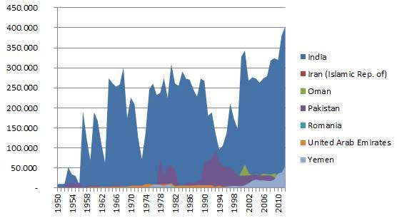 Veiðar á Indverskri olíu sardínu